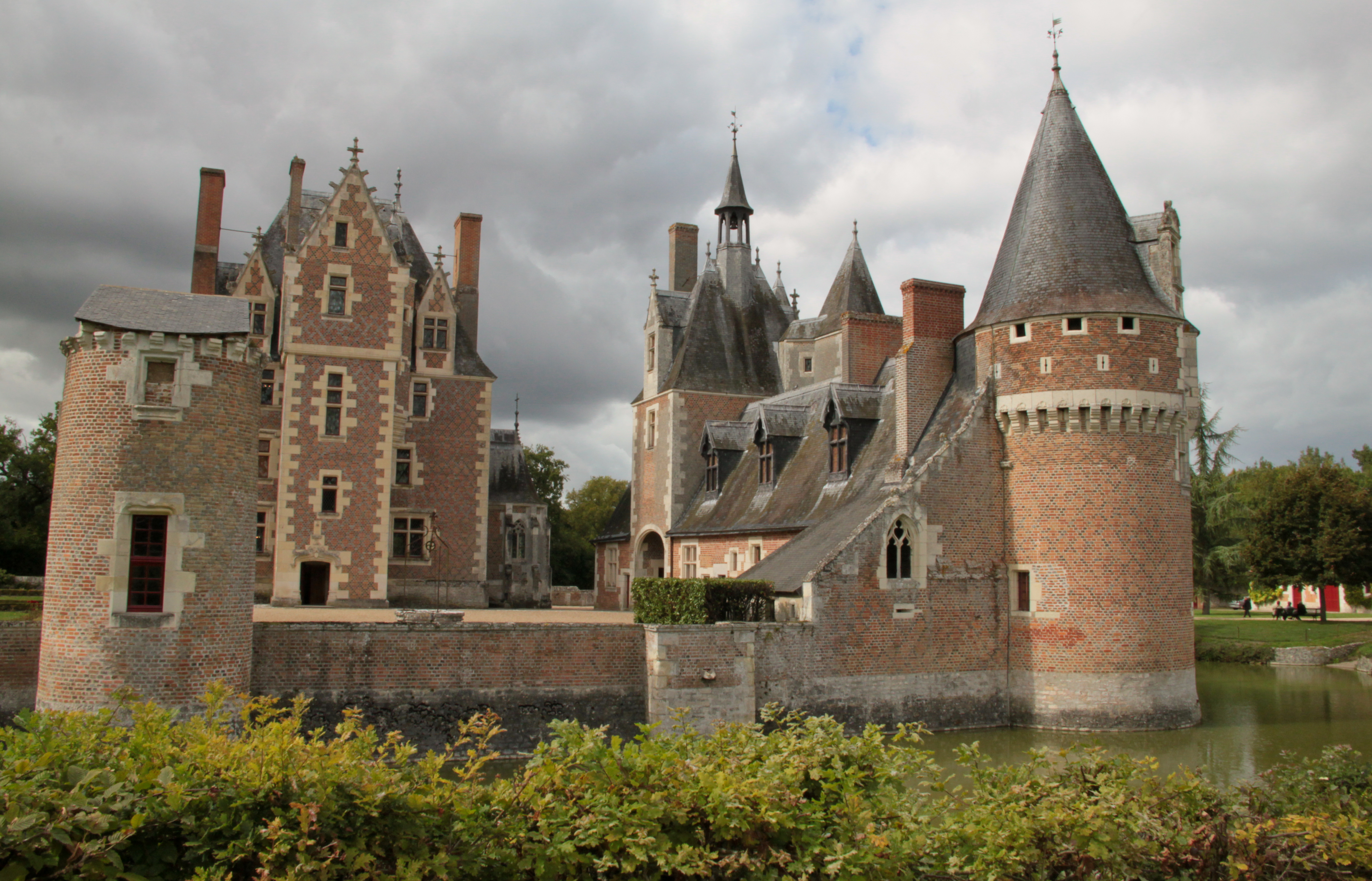 Lassay sur Croisne, Loir et Cher,Journée du Patrimoine